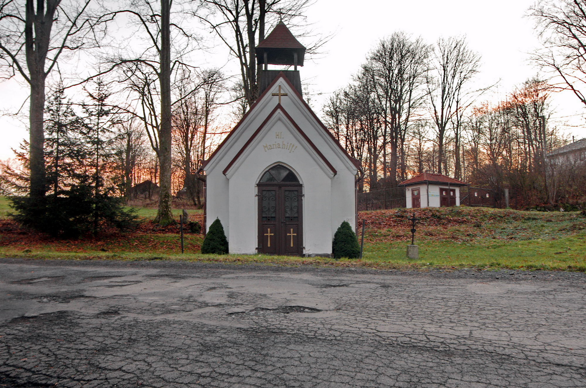 Horní Nivy (osada obce Dolní Nivy), kaplička, okres Sokolov